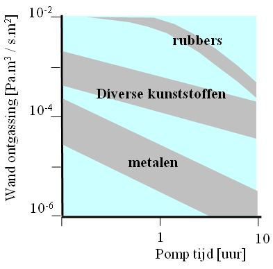 vacuum ontgassingscurves